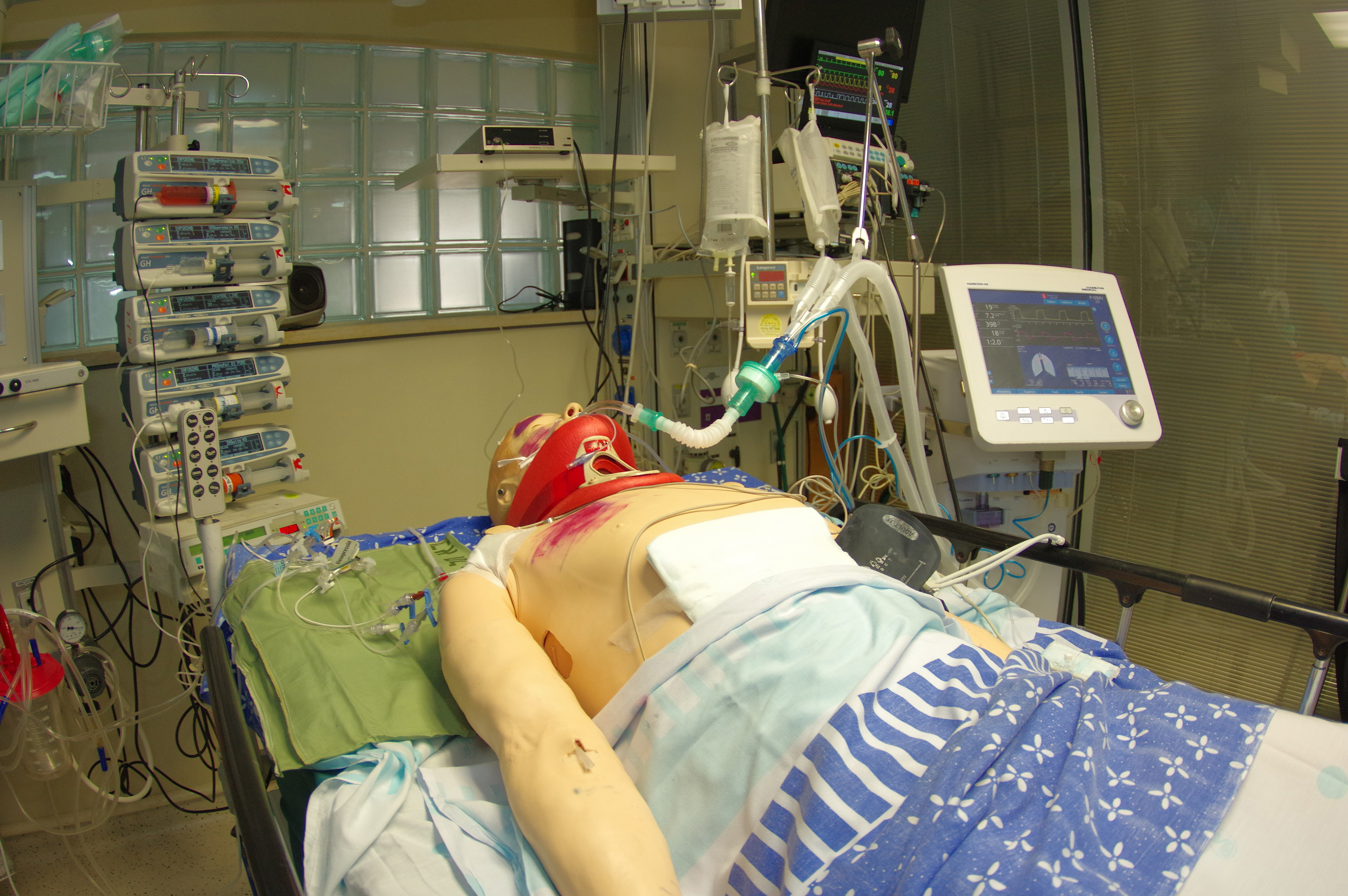 בובות חכמות - סימולטורים המתבססים על בובות מתקדמות הבנויות ממערכות פנאומטיות ומערכות מחשוב מתקדמות. הבובות מגיבות פיזיולוגית לטיפול המוענק להן ונותנות פידבק על כל פרוצדורה, מהקאה ועד תזוזה בעת מתן שוק חשמלי.